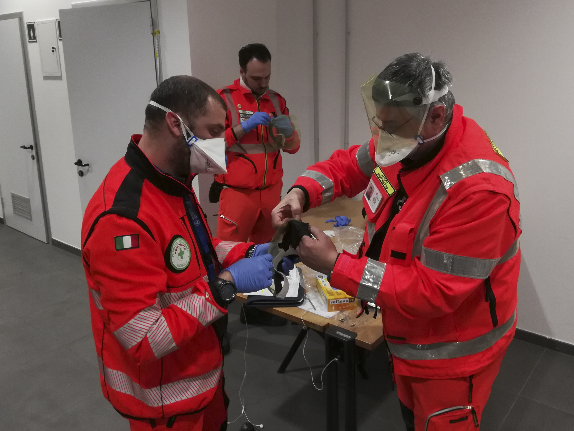 Bologna, 5 febbraio 2020 – Volontari di protezione civile impegnati nei controlli sanitari nell'aeroporto "Guglielmo Marconi".